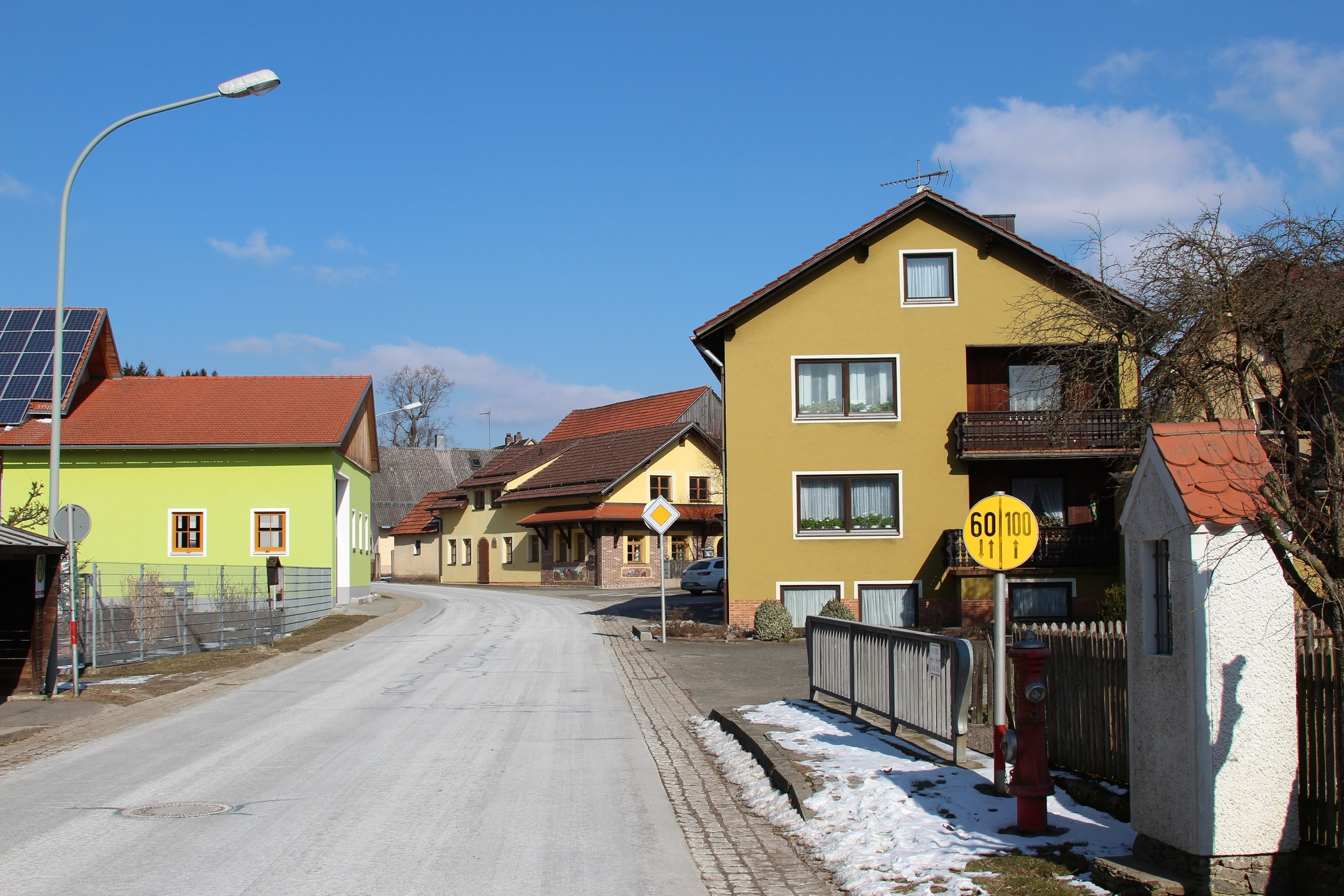 Ortsdurchfahrt von Schneeberg im Markt Winklarn